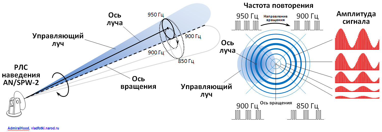 Система наведения ЗРК «Талос»